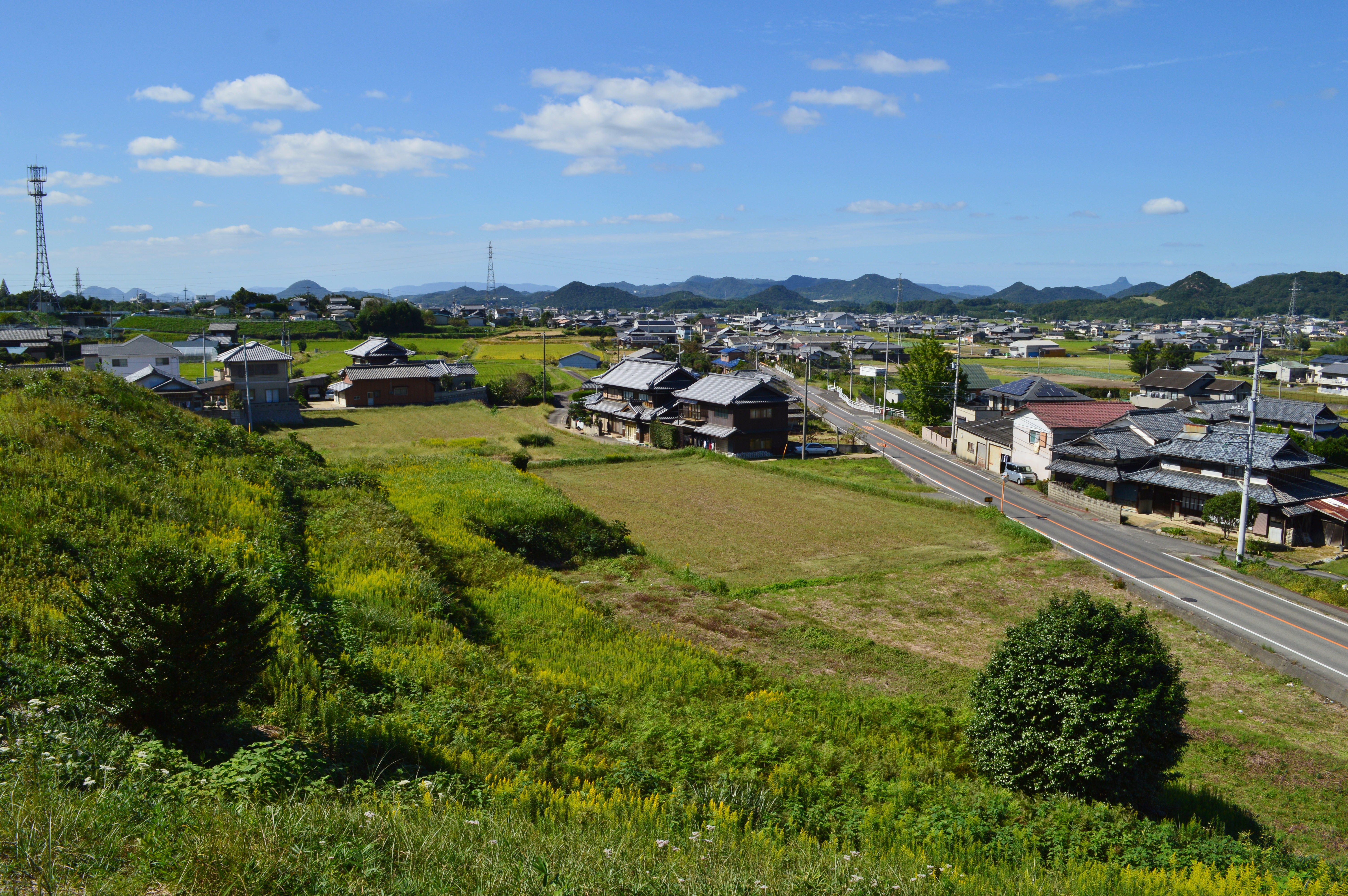 富田茶臼山古墳 後円部から前方部・長尾平野を望む